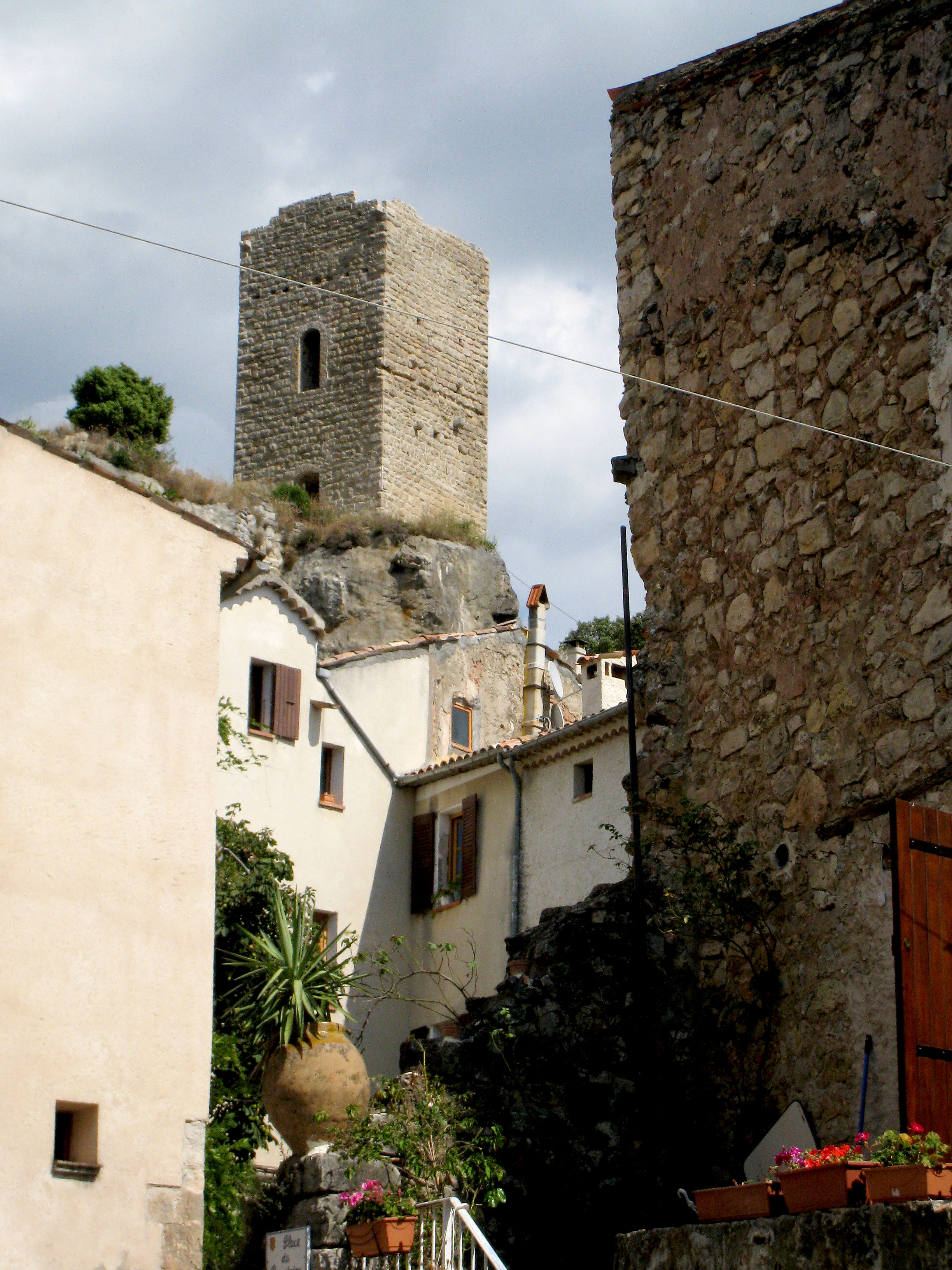 Tour sarrasine (Inscrit) .